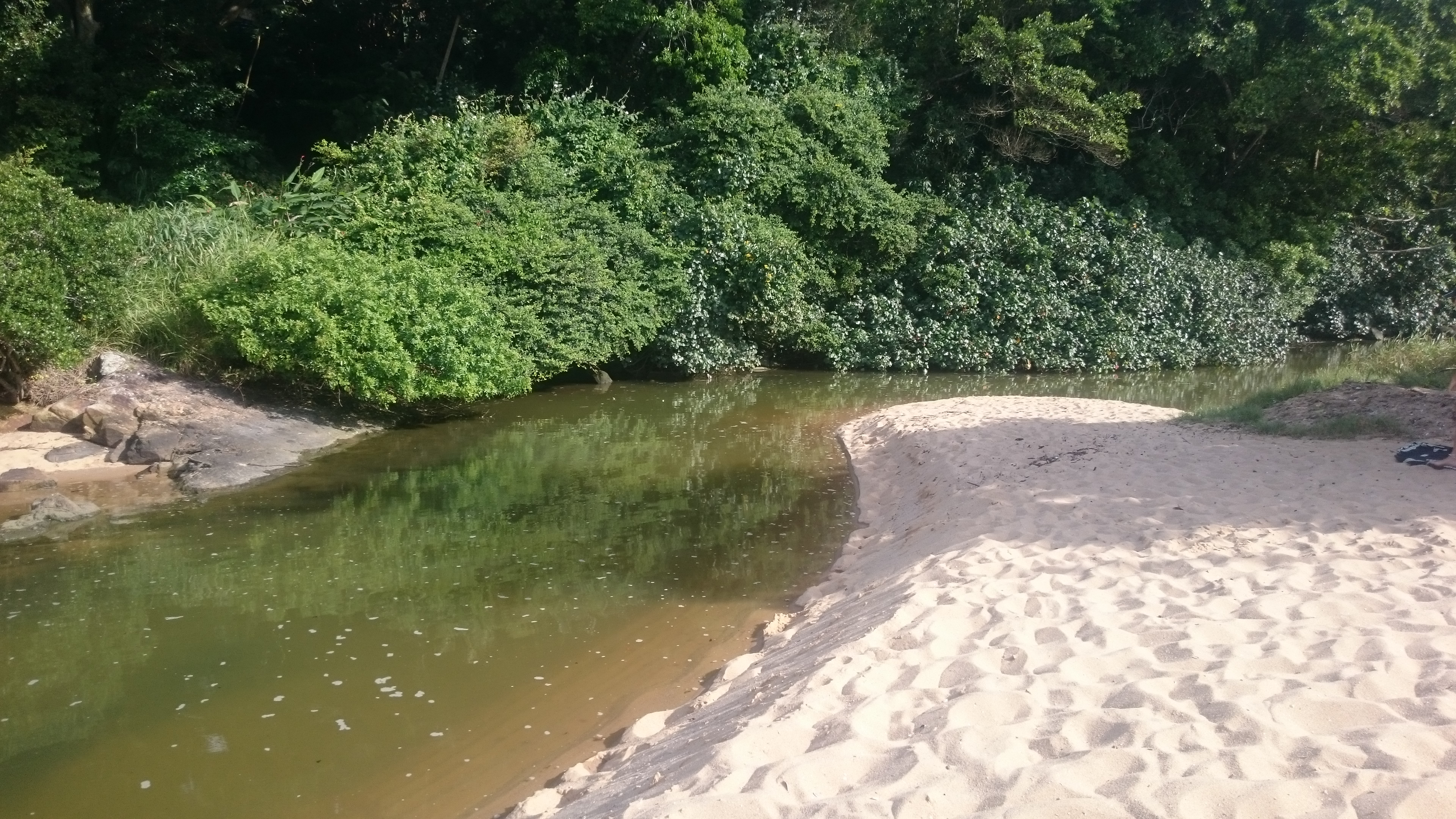 Tirada em frente ao Bar Das Antigas